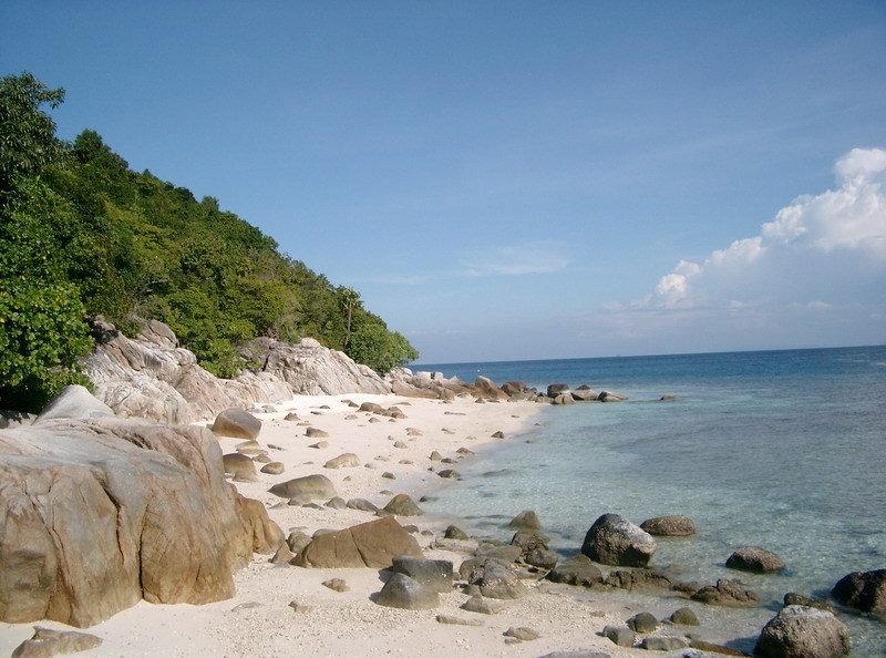 Lang Tengah